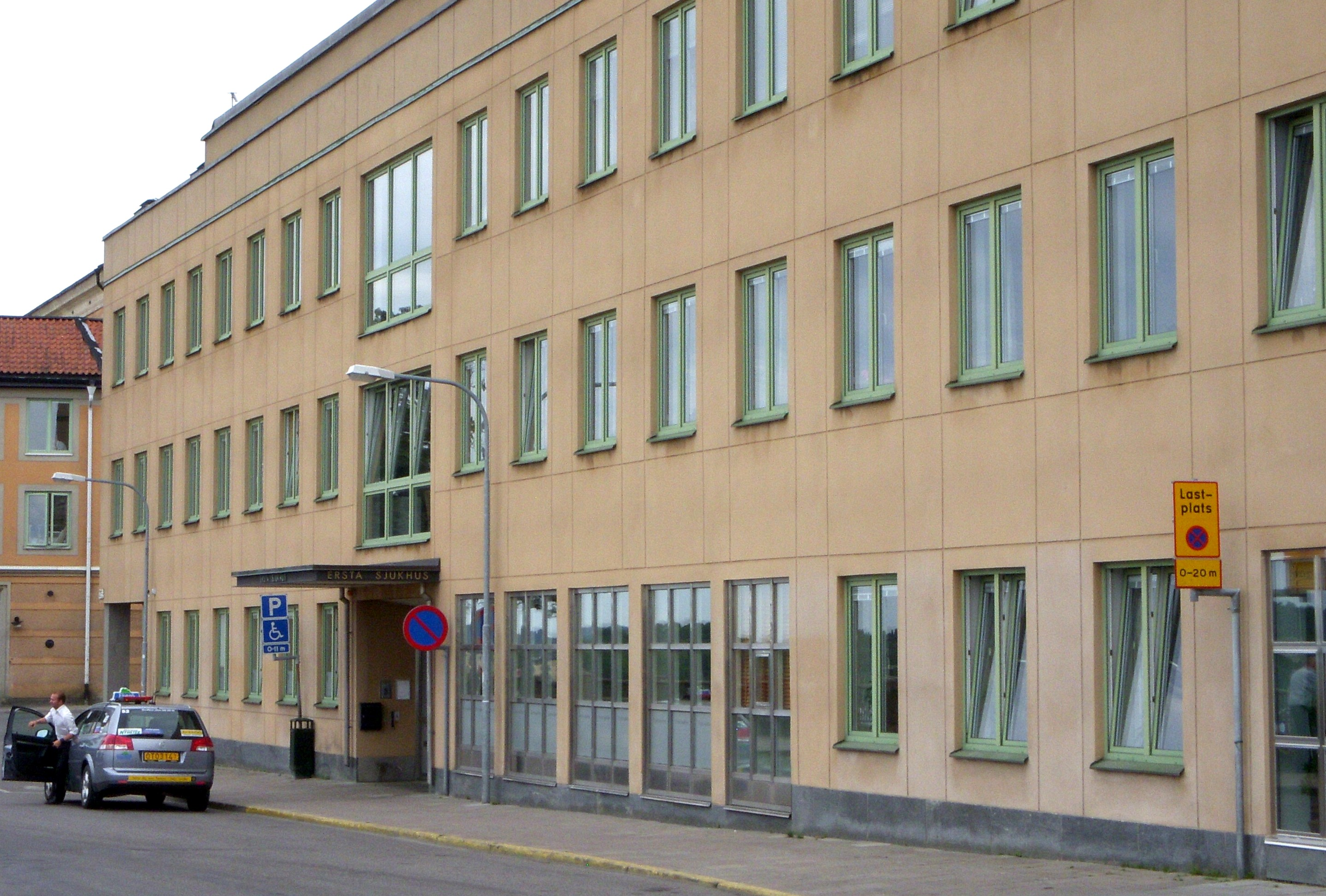 Ersta sjukhus, Fjällgatan, Södermalm, Stockholm